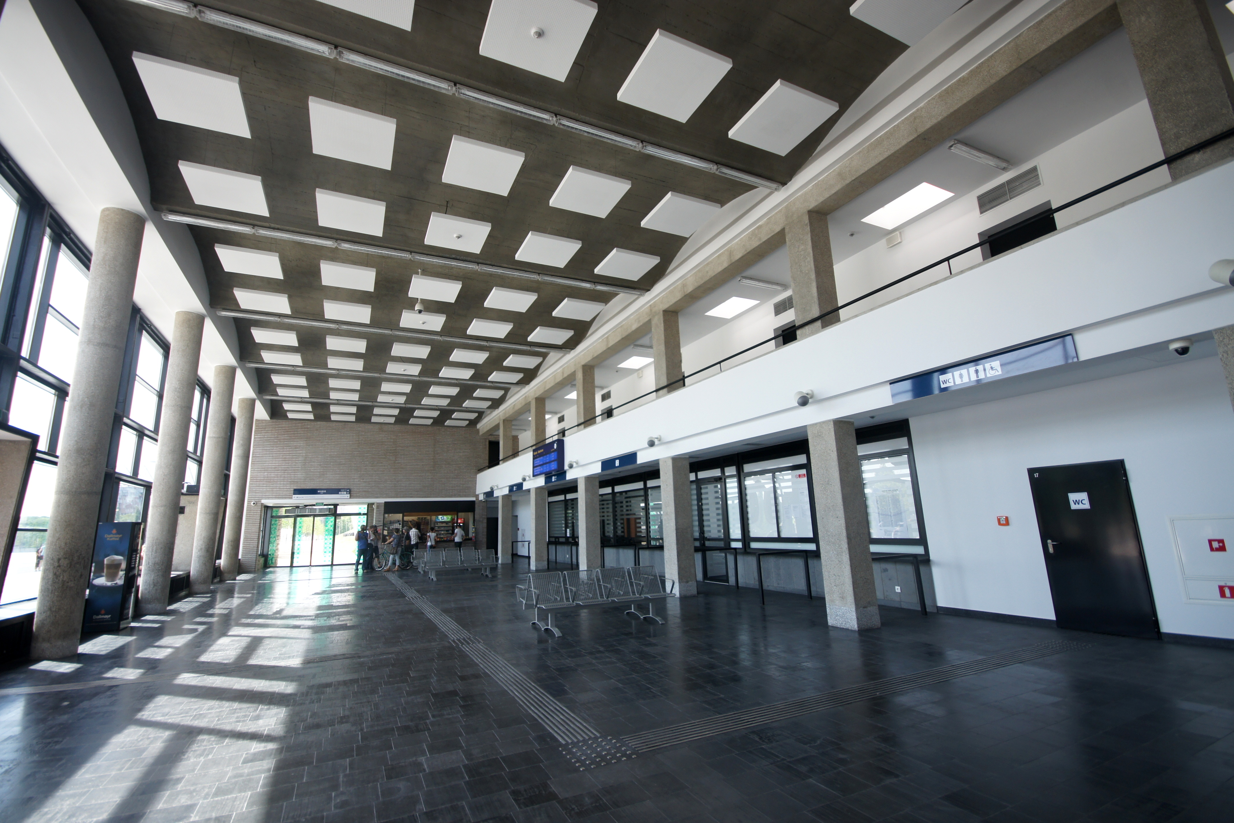 Budynek kas - Stacja Warszawa Stadion - 05.05.2012 - dzień otwarcia po remoncie